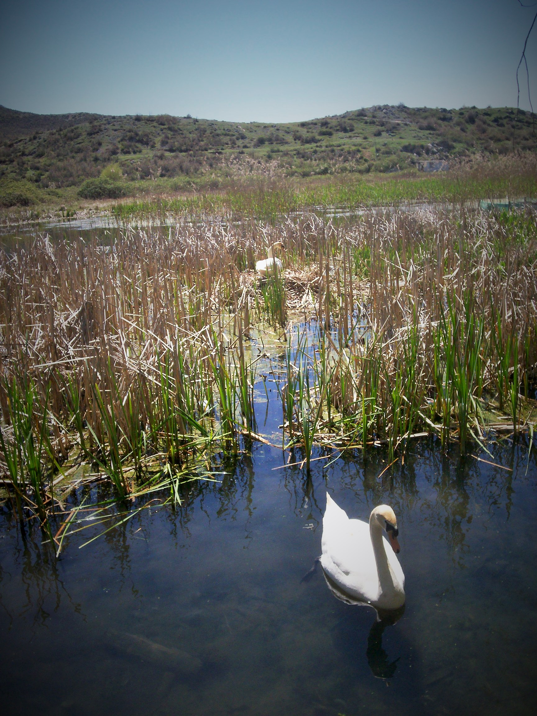 Pogradec, Pogradec